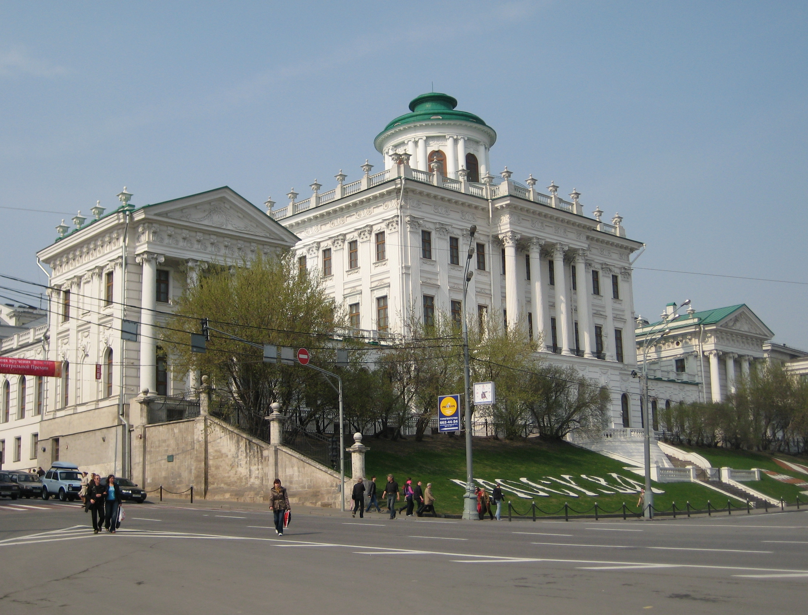 Pashkov house